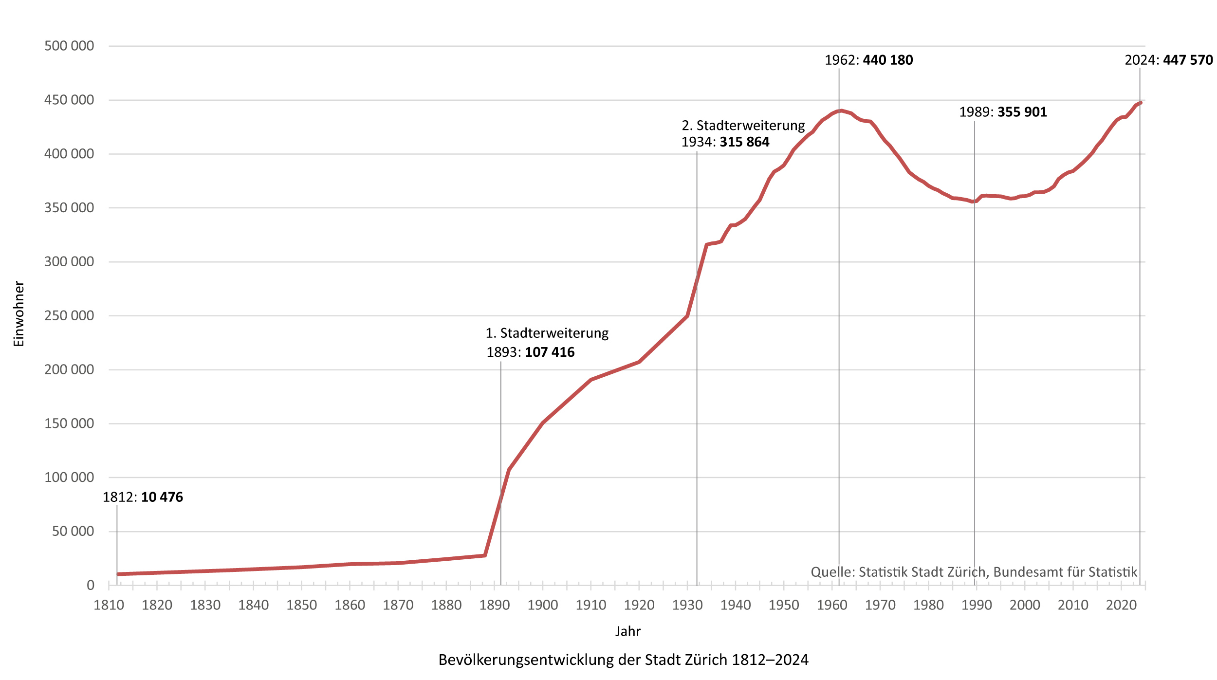 Bevölkerungsentwicklung der Stadt Zürich zwischen 1836 (erste Schweizerische Volkszählung) und 2009. Nach Daten der Schweizerischen Volkszählung, eidgenössische Volkszählung, Statistik Stadt Zürich.